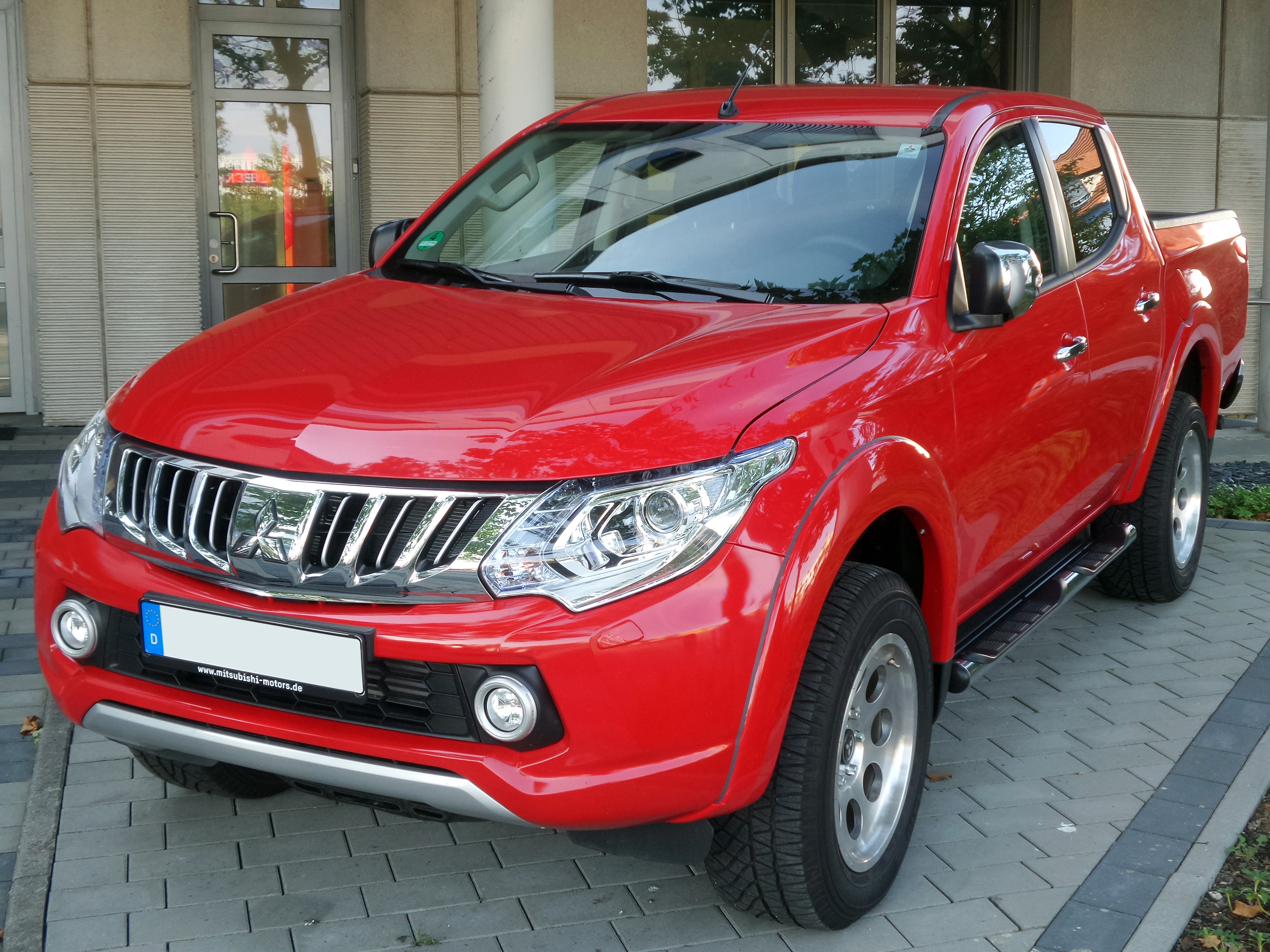 Mitsubishi L200 der 5. Generation